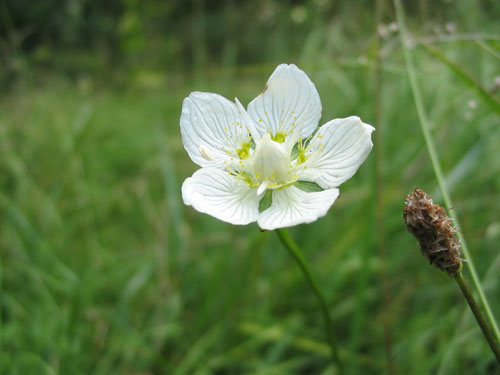 Sumpf-Herzblatt (Parnassia palustris)